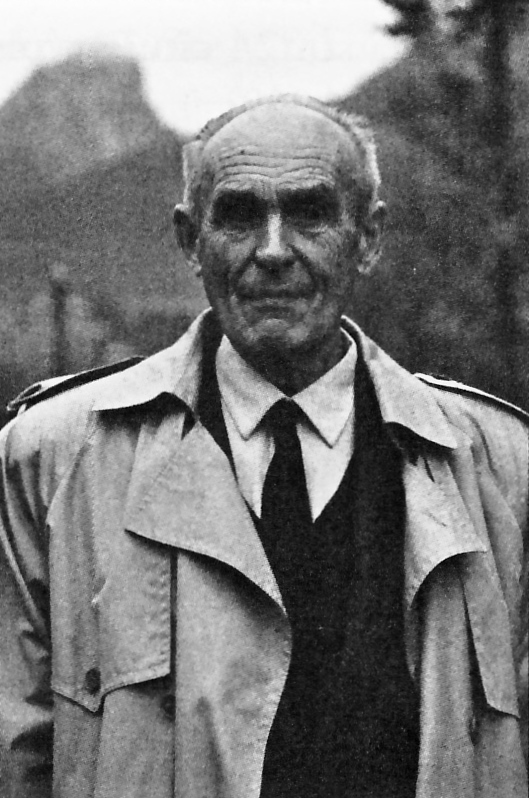 Doc. RNDr. Antonín Mrkos, CSc. (* 27. január 1918, Střemchoví – † 29. máj 1996, Praha) bol český astronóm. Vyštudoval astronómiu na Prírodovedeckej fakulte Slovenskej univerzity v Bratislave. V rokoch 1946 až 1950 pracoval na astronomickom observatóriu na Skalnatom plese, neskôr (1950 až 1961) na observatóriu na Lomnickom štíte vo Vysokých Tatrách.